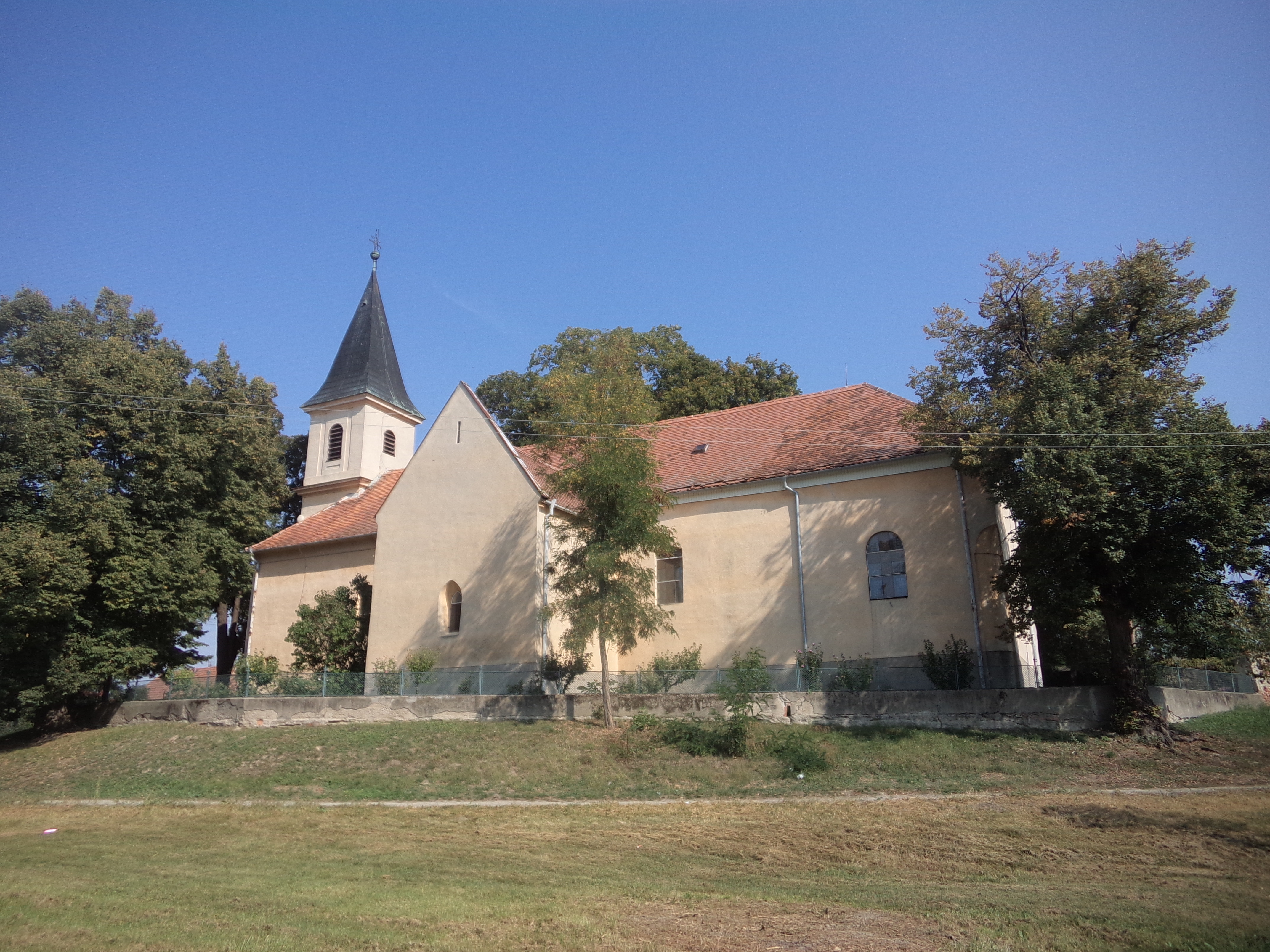 Nyitraegerszeg